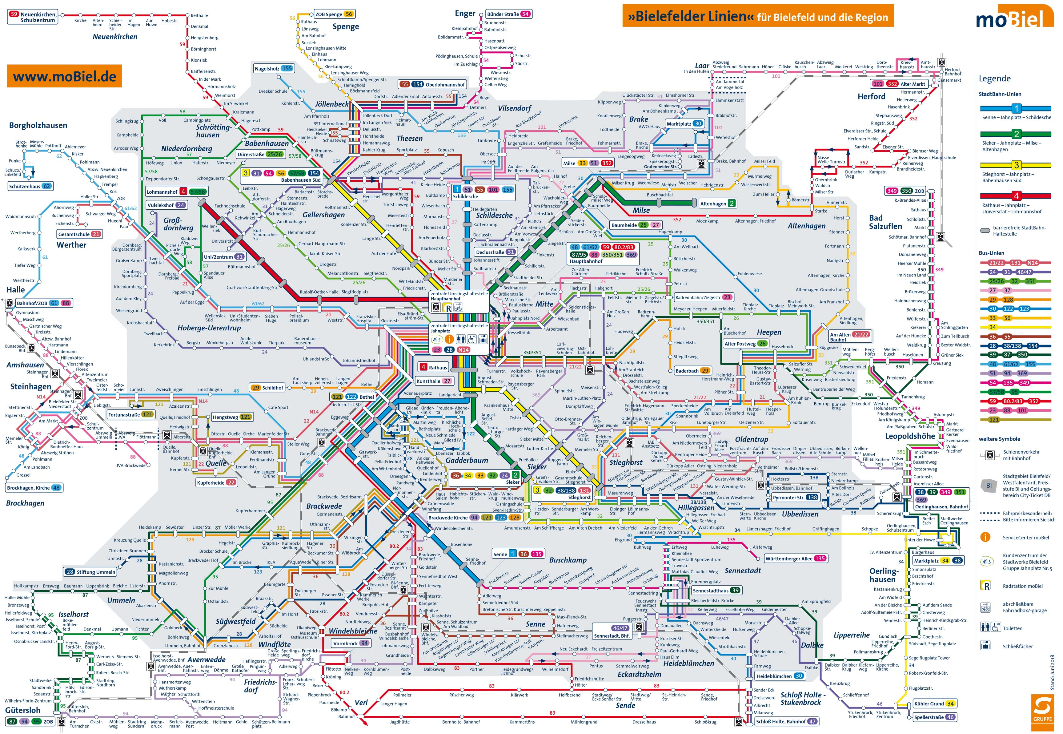 Netz von Bielefeld